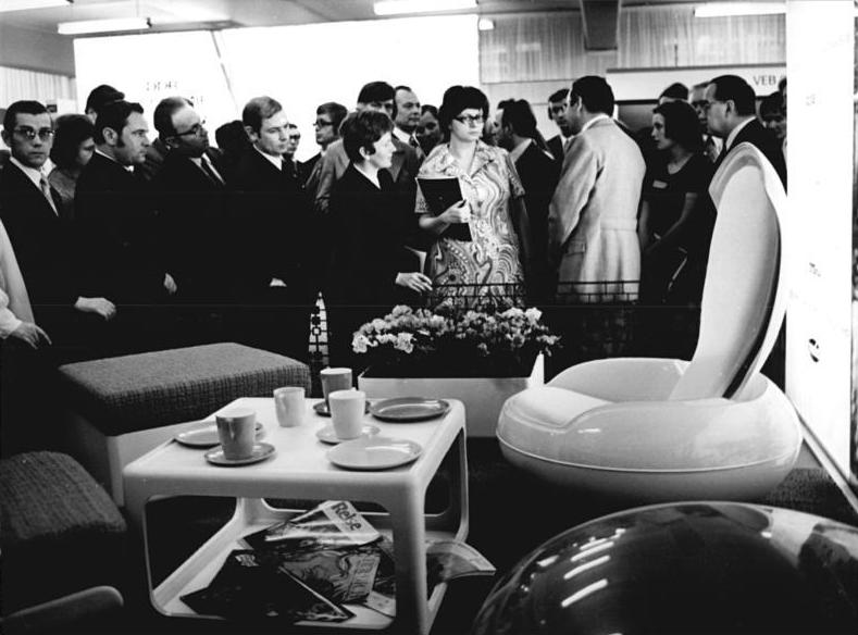 Leipzig, Messe, Möbel ADN-Raphael-12.3.1973 Leipzig-Messe; Möbel aus Thermoplaste im Dresdner Hof ausgestellt- Zum Sortiment der im Dresdner Hof ausgestellten Polyurethanmöbel gehört eine ganze Palette sogenannter Beistellmöbel, die vorwiegend für die Ausstattung von Wohnzimmern geeignet sind. Darunter befinden sich auch ein speziell zu diesem Zweck entwickelter Drehsessel "Schwedt" sowie Hocker, Tische verschiedener Abmessungen und Blumenwannen. Die Polsterung der Sessel und Hocker erfolgt mit weichen Polyurethanschaumstoffen.